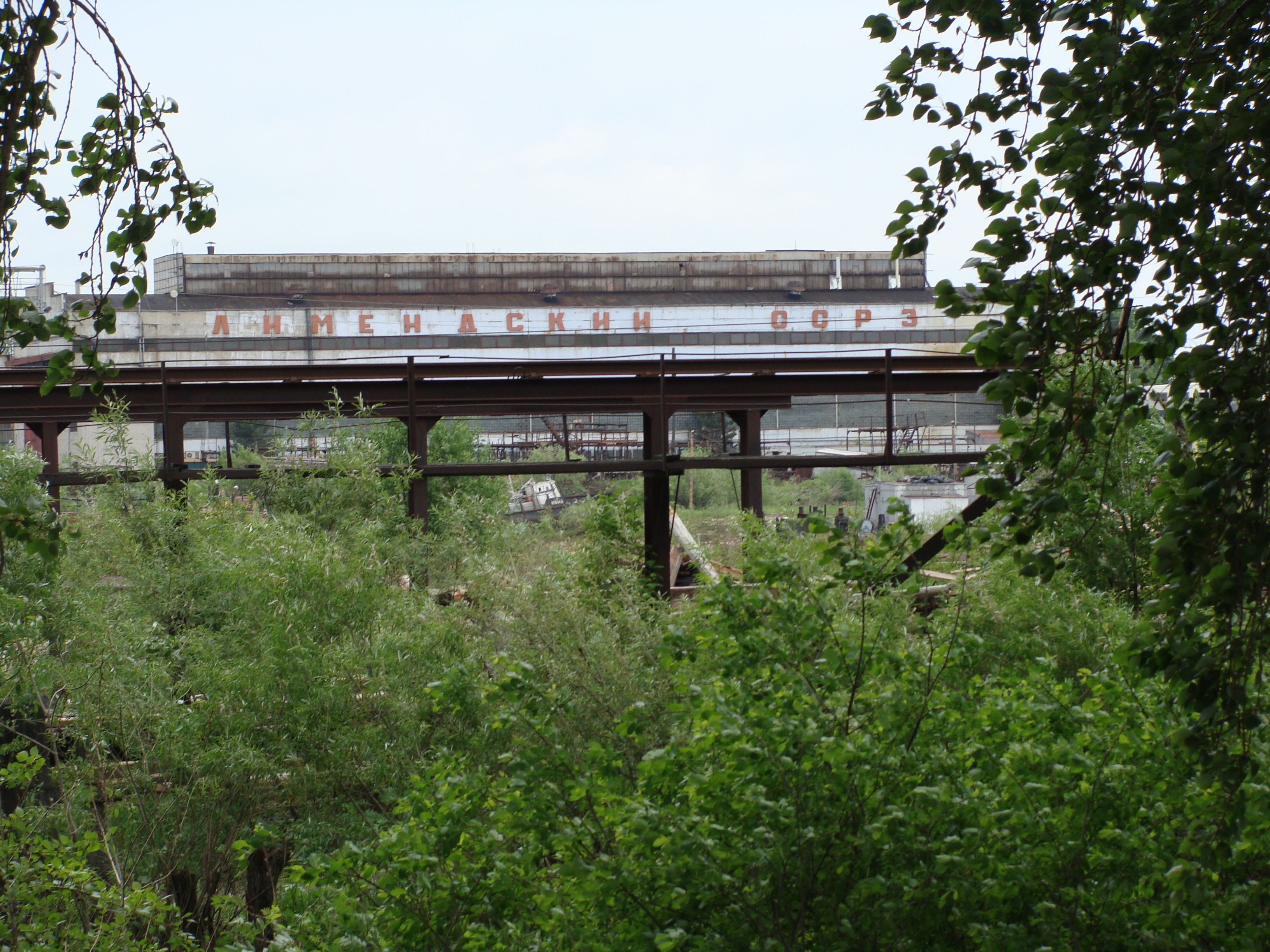 Лимендский ССРЗ, Котлас